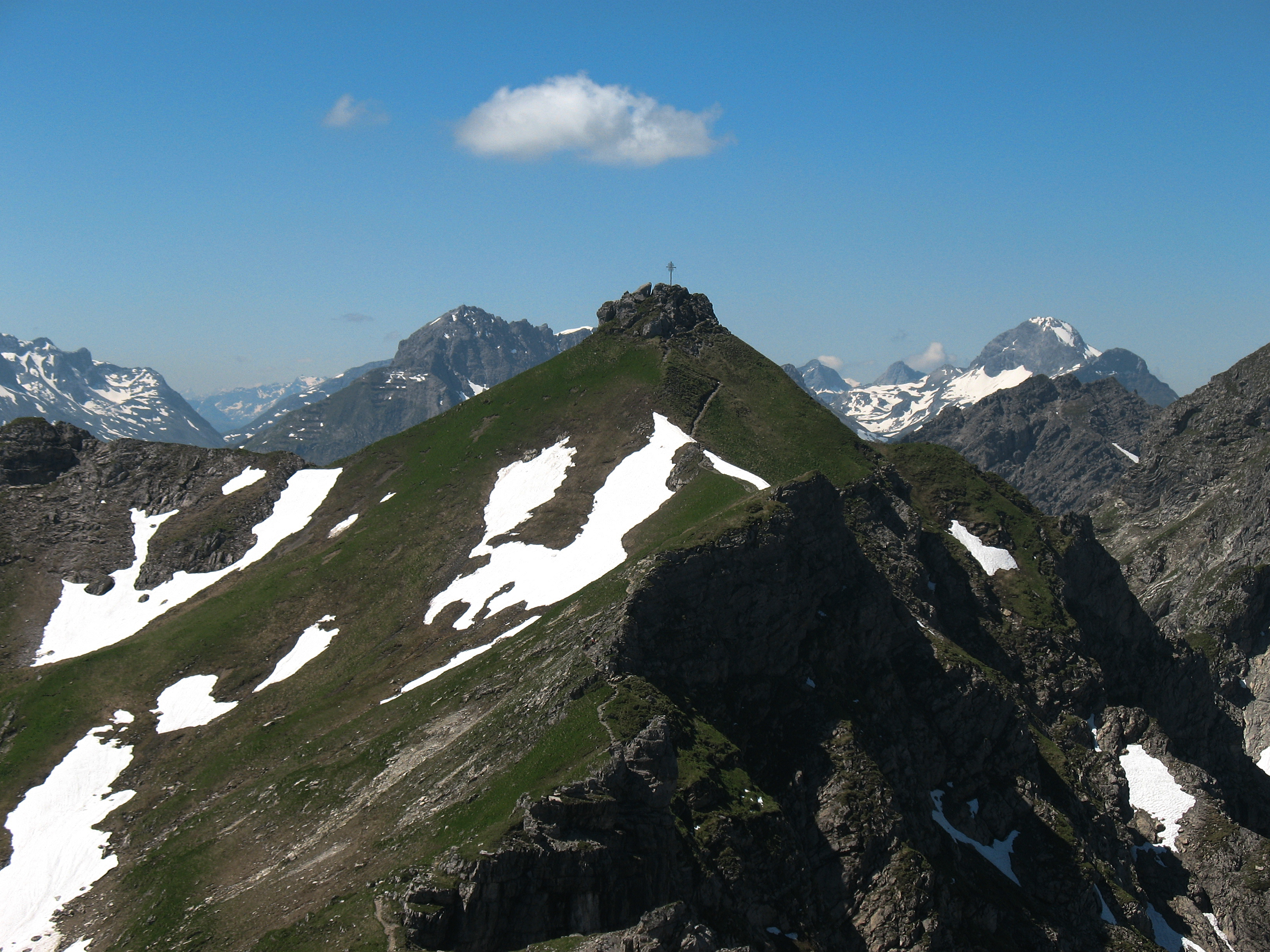 Kemptner Kopf (2191 m) vom Ersten Schafalpenkopf.